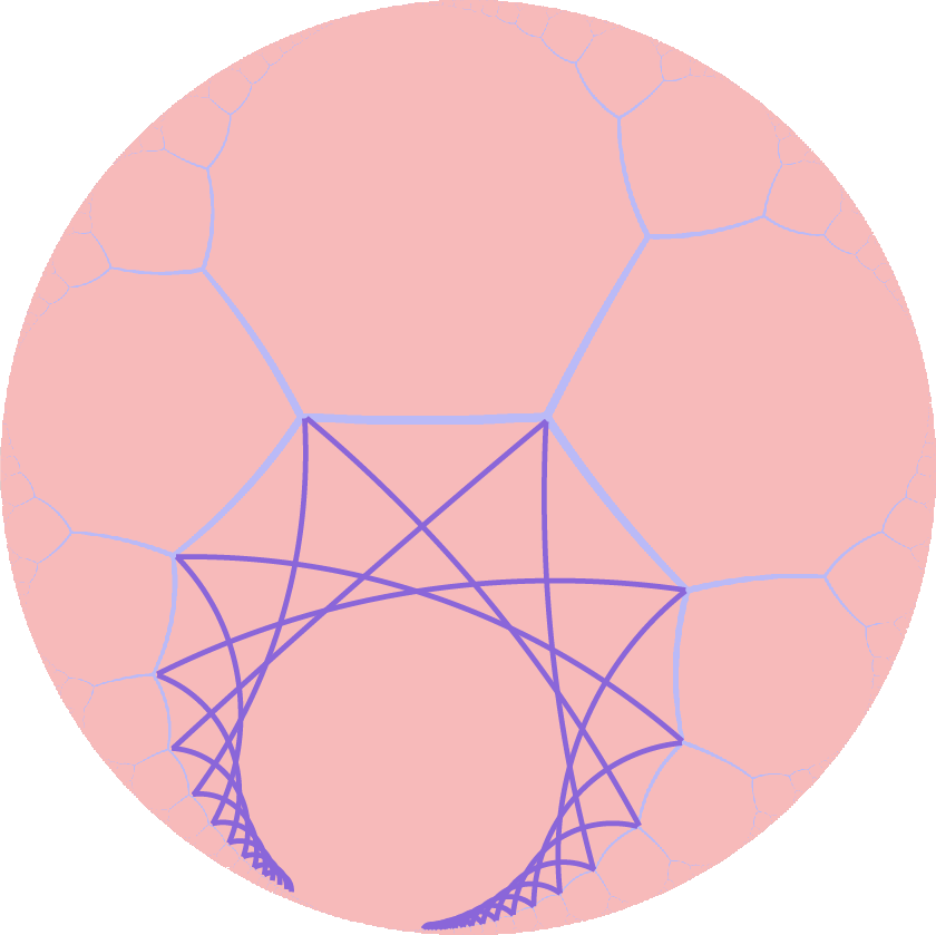 中文（台灣）: 雙曲面上的無限角星{∞/4}